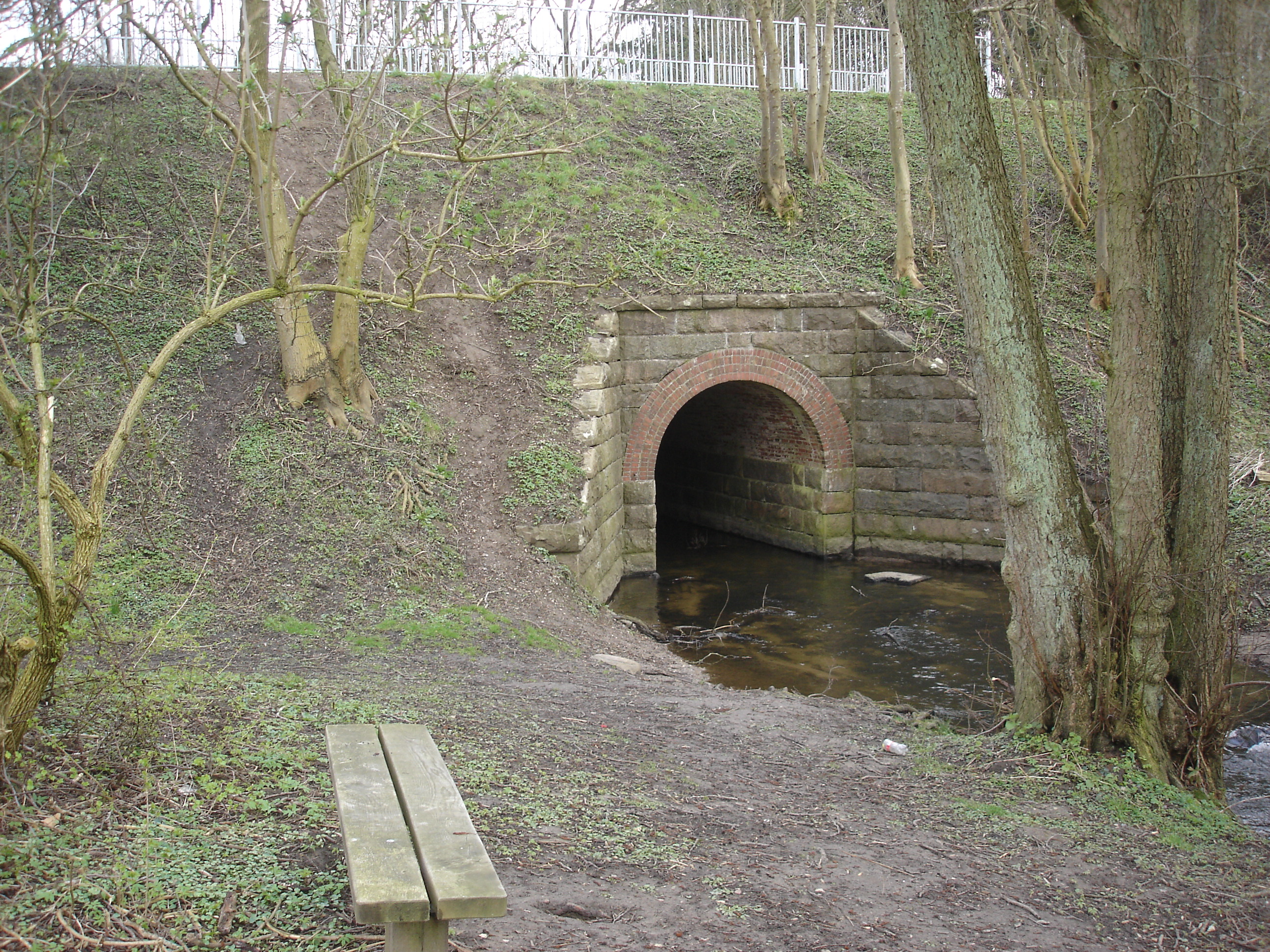 Nyborg-Ringe-Faaborg-banens bro over Sallinge Å syd for Ringe